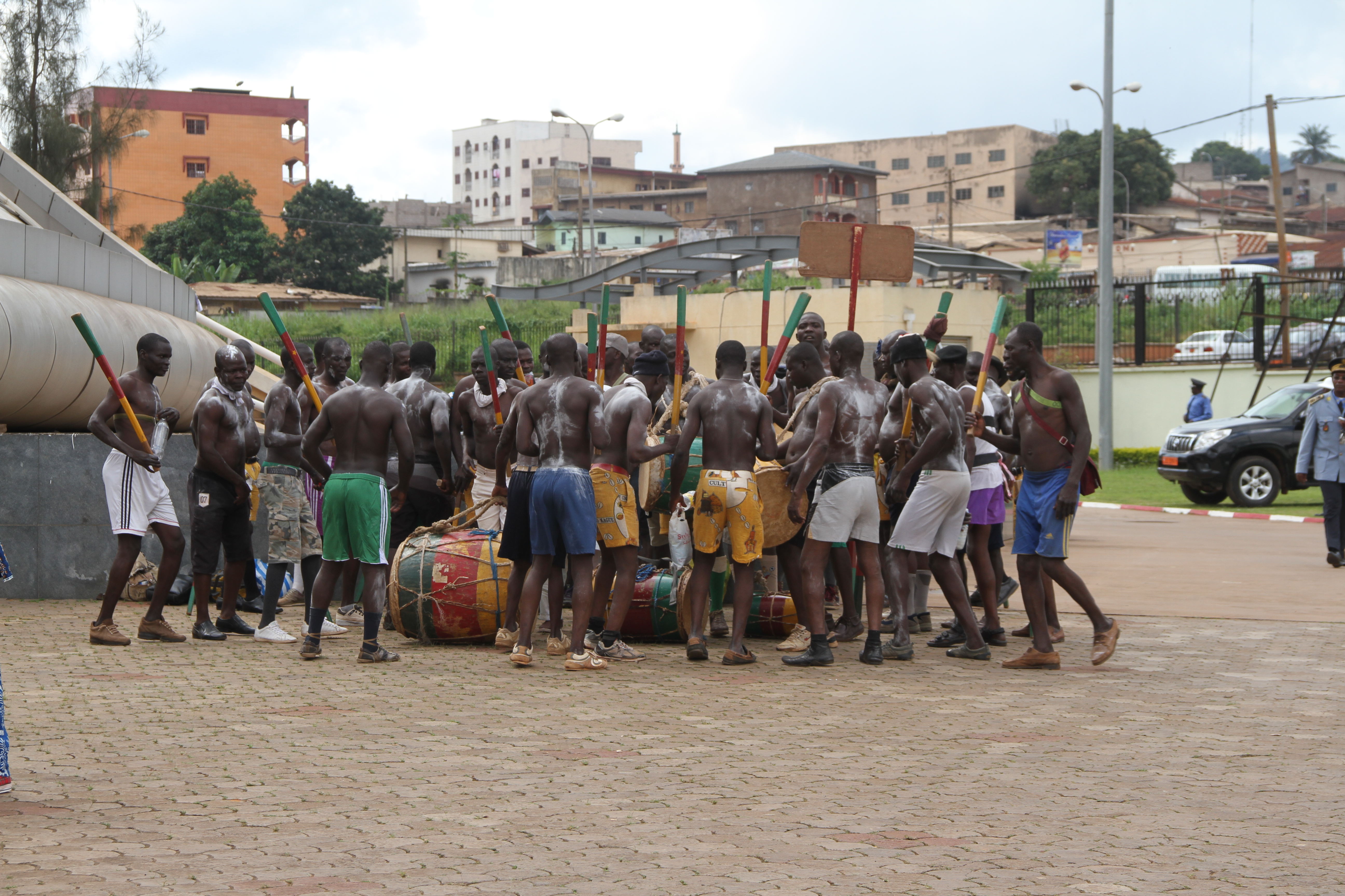 Groupe de danse toupouri du nord du Cameroun présentés lors du Fenac (Festival National des Arts et de la Culture) à Yaoundé au Cameroun This is an image from Cameroon